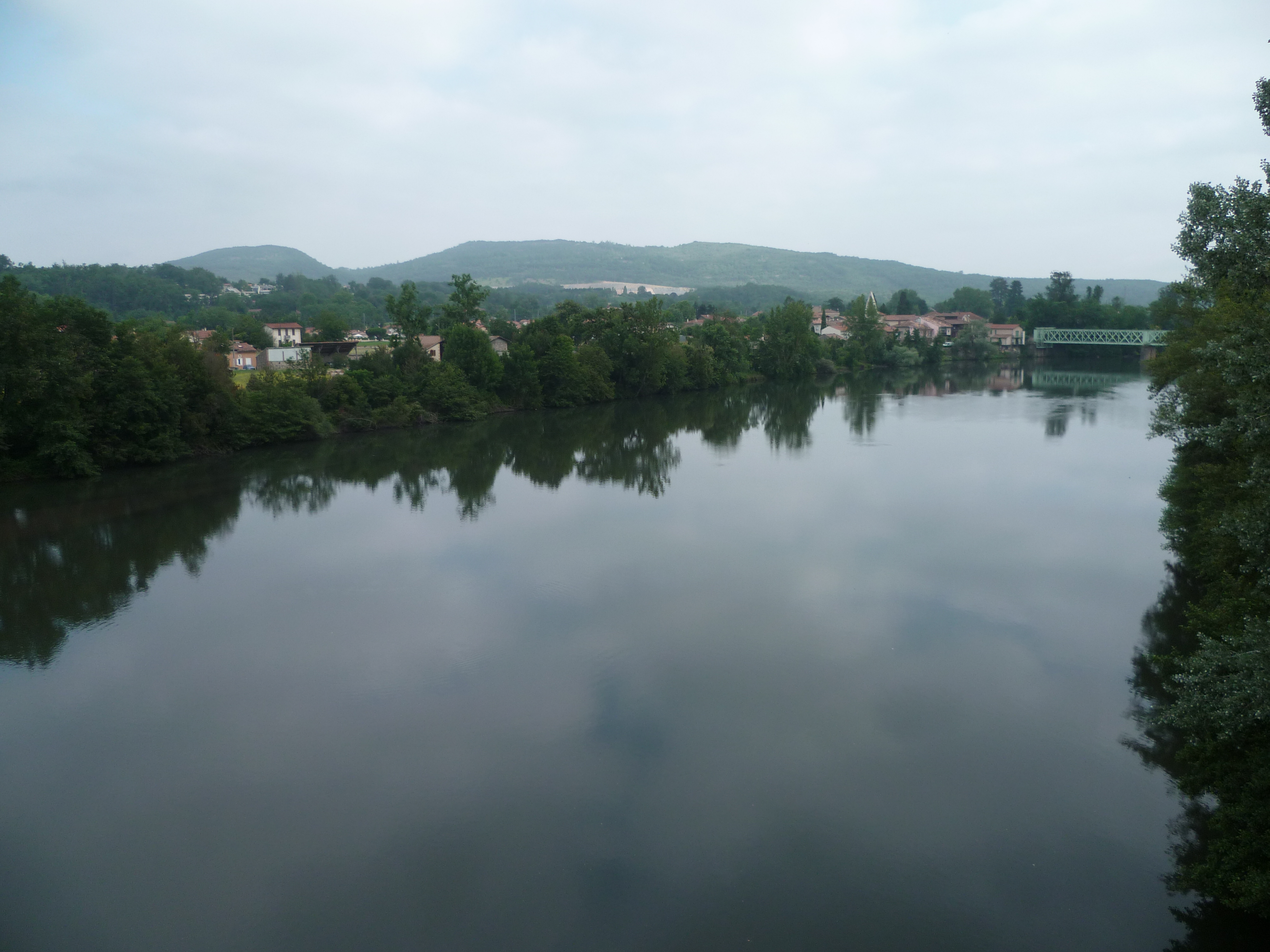 La Garonne à Boussens (Haute-Garonne, Midi-Pyrénées, France).